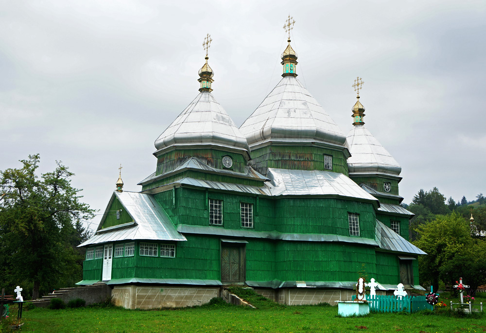 Василiвська церква (дер.), Конятин Фото: ВздовжКарпатська Експедиція, 27.07-28.08.2013